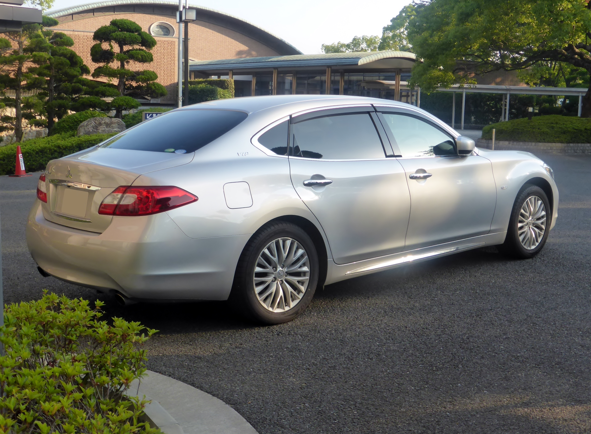 BHGY51型三菱・ディグニティVIPをリアから撮影。